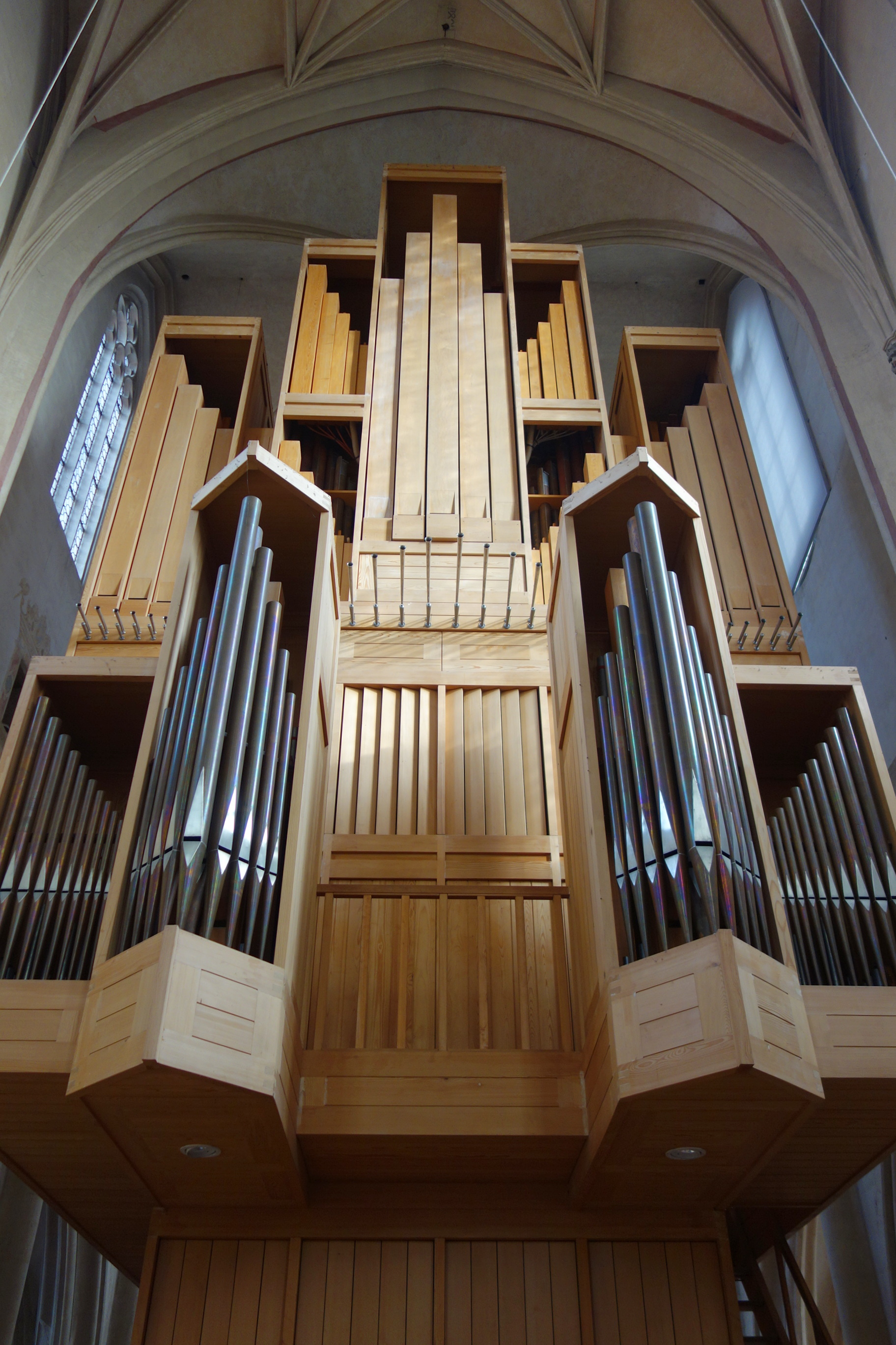 Orgel von St. Jakob Rothenburg ob der Tauber, Landkreis Ansbach, Deutschland